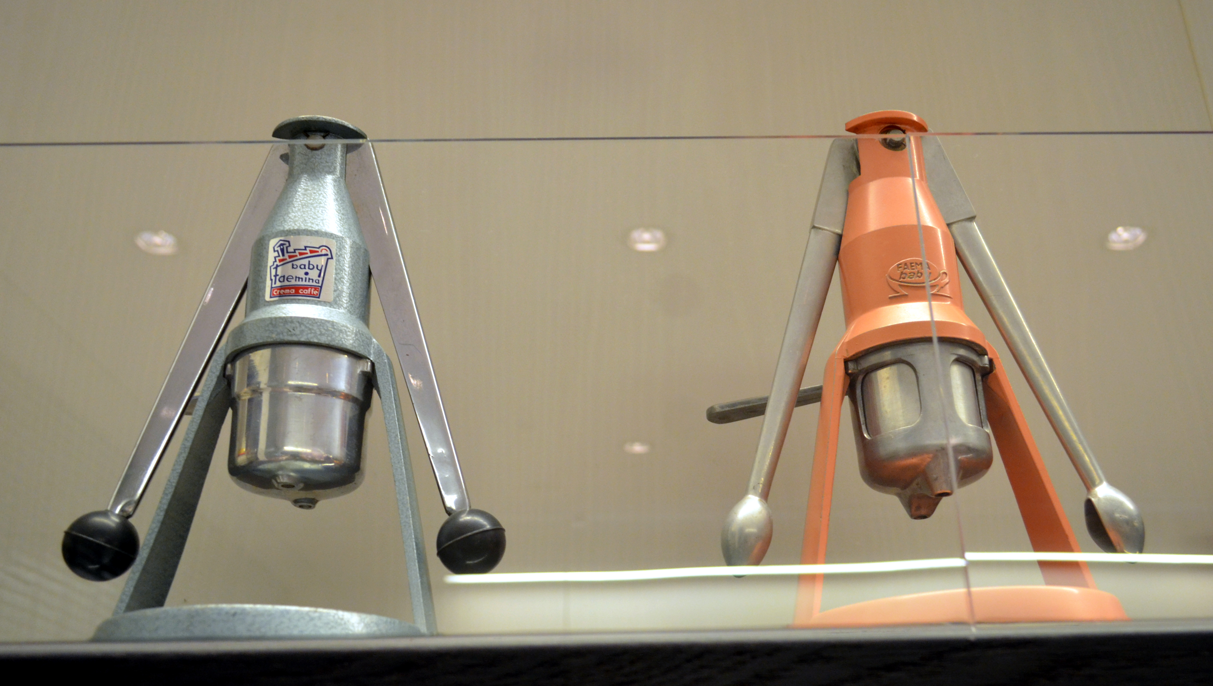 Due versioni di Faema baby (1950-1960) della Faema - Mumac- Italia.